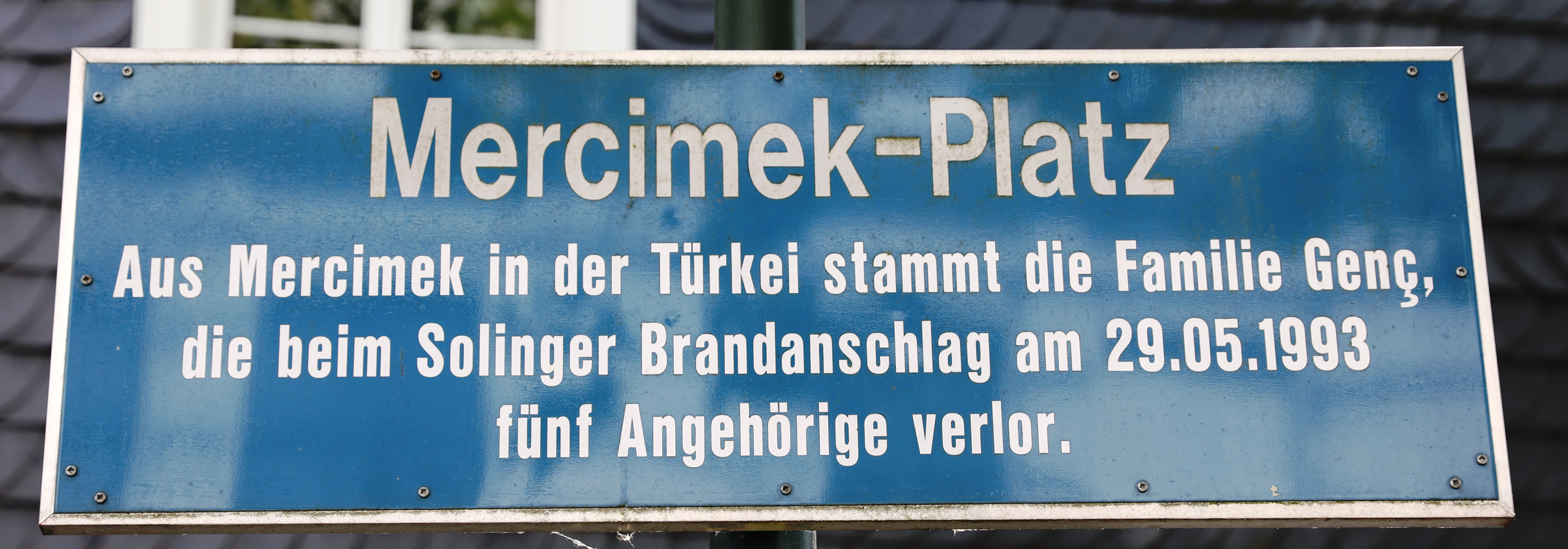 Straßenschild des Mercimek-Platzes in Solingen